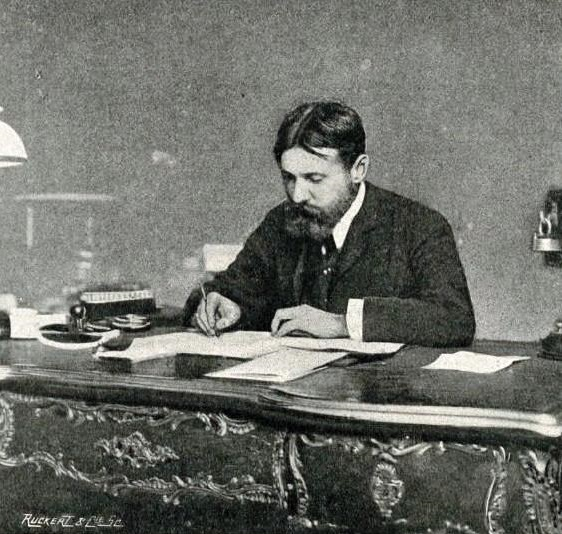 Henri Desgrange à son bureau en janvier 1905.